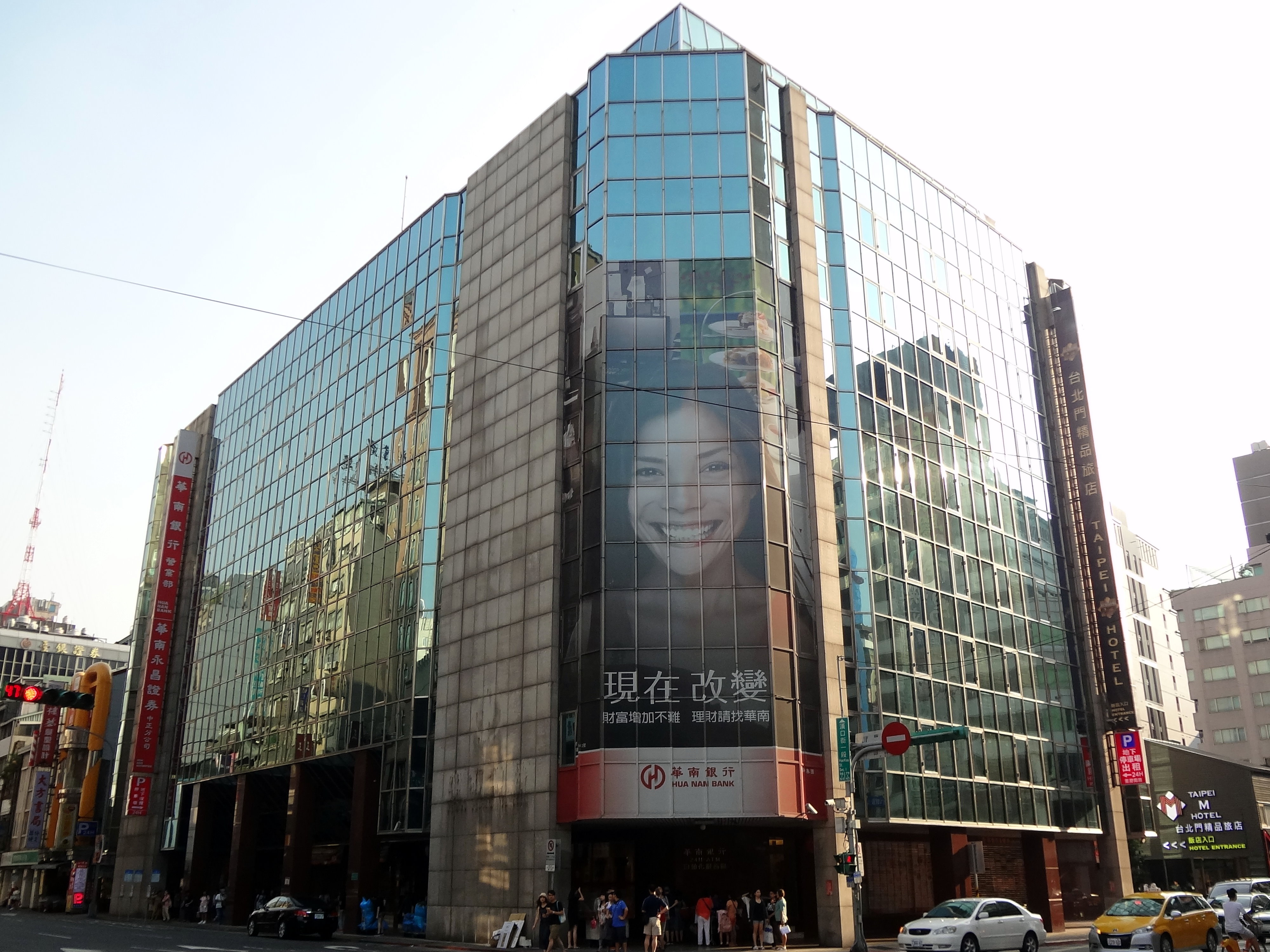 華南商業銀行營業部，位於臺北市中正區重慶南路一段38號。